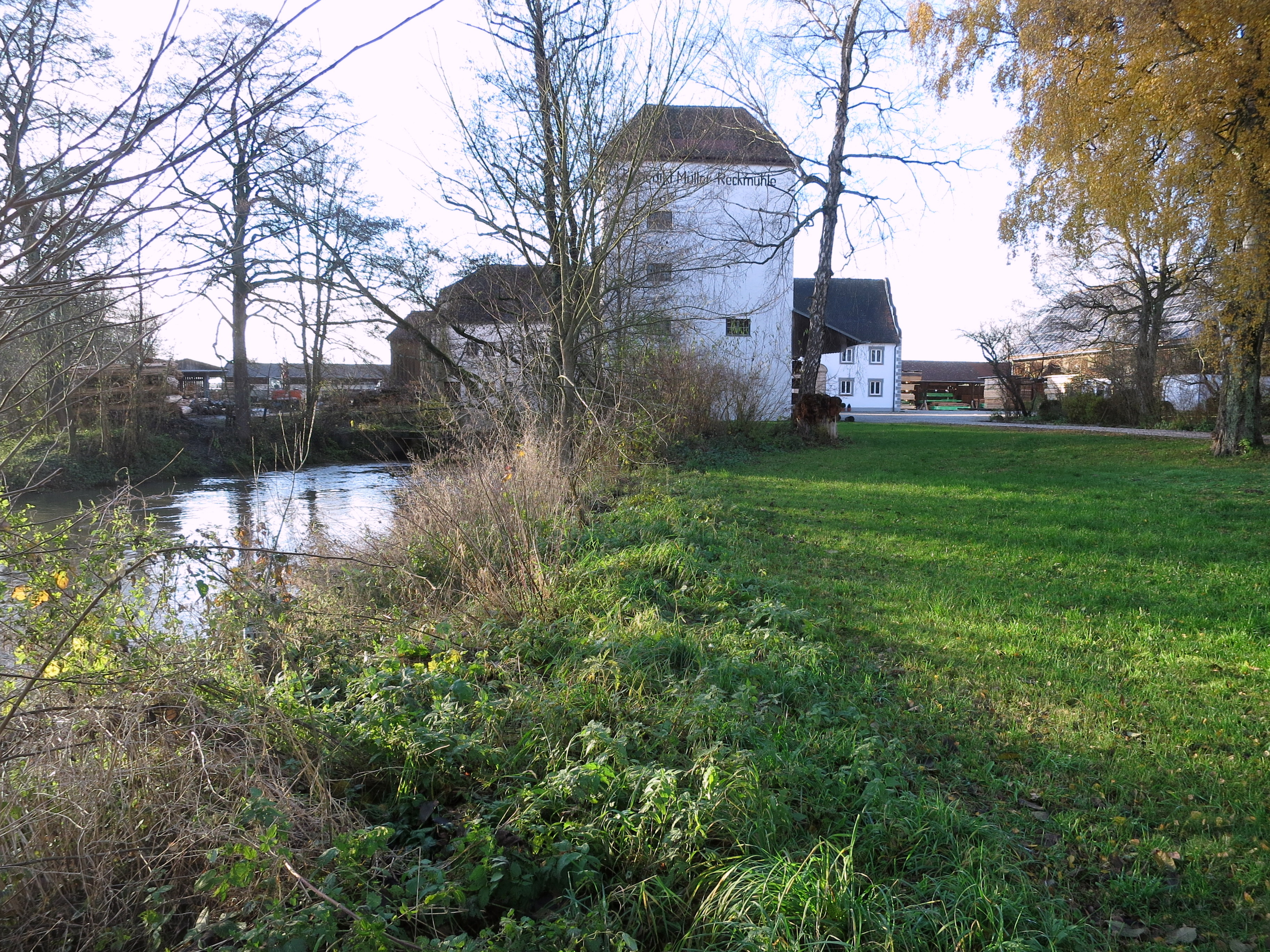 Gesamtanlage mit Glonn